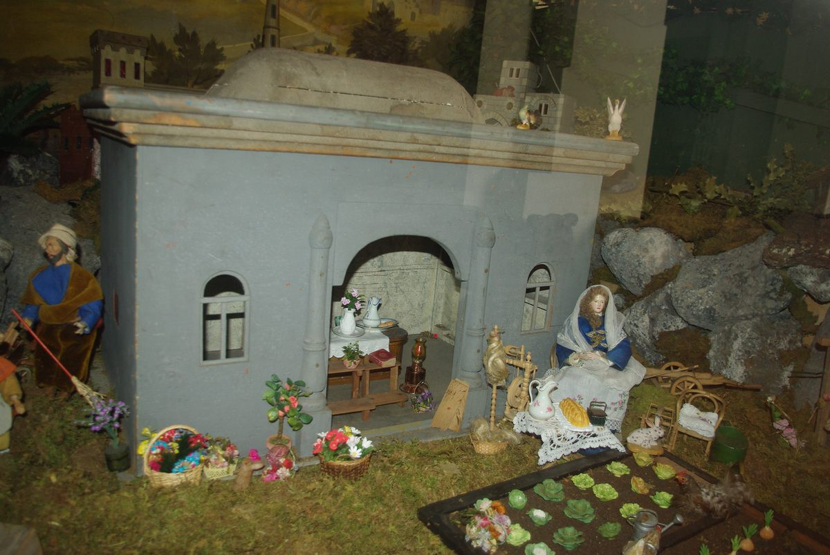 Krippe in der Kirche St. Zeno in 83435 Bad Reichenhall; Darstellung Haus Nazareth